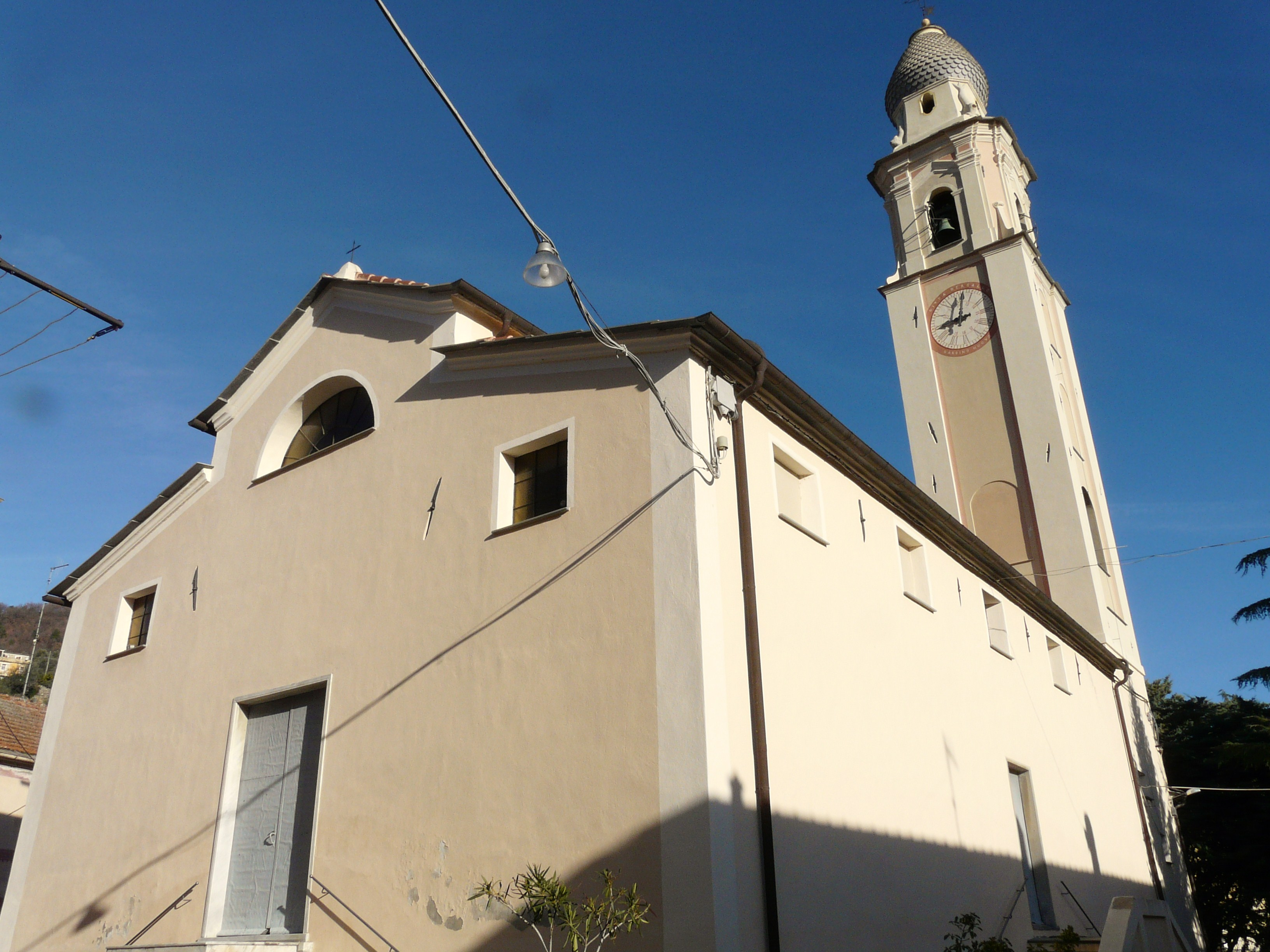 Chiesa di Sant'Antonino, Casanova Lerrone, Liguria, Italia